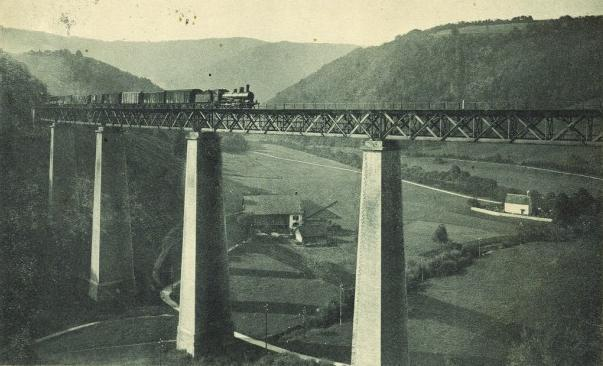 Der Viadukt St. Ursanne stammt aus den Jahren 1875-76, wurde im 20. Jahrhundert zum Baudenkmal erklärt und zwischen 2000 und 2002 vollständig saniert. Der Originaleisenbahntrakt wurde durch grosse Fertigteilelemente ersetzt.